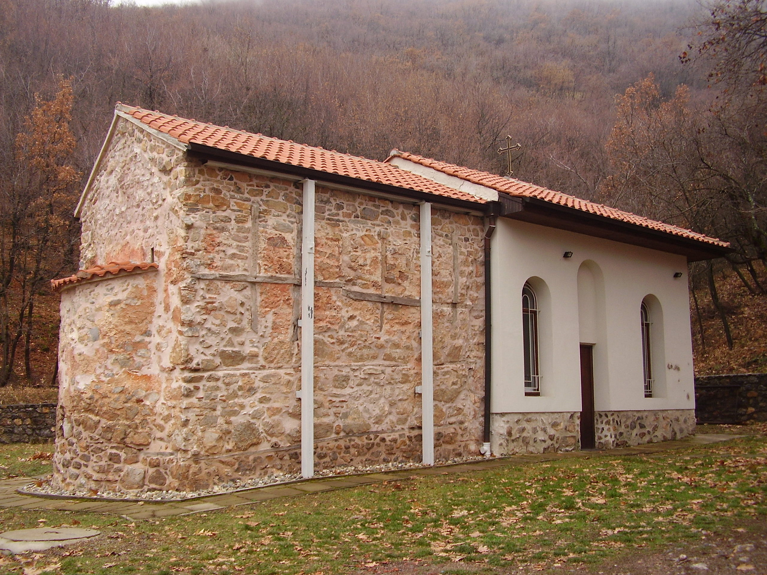 Средновековната манастирска църква "Свети Димитър" до гр.Бобошево